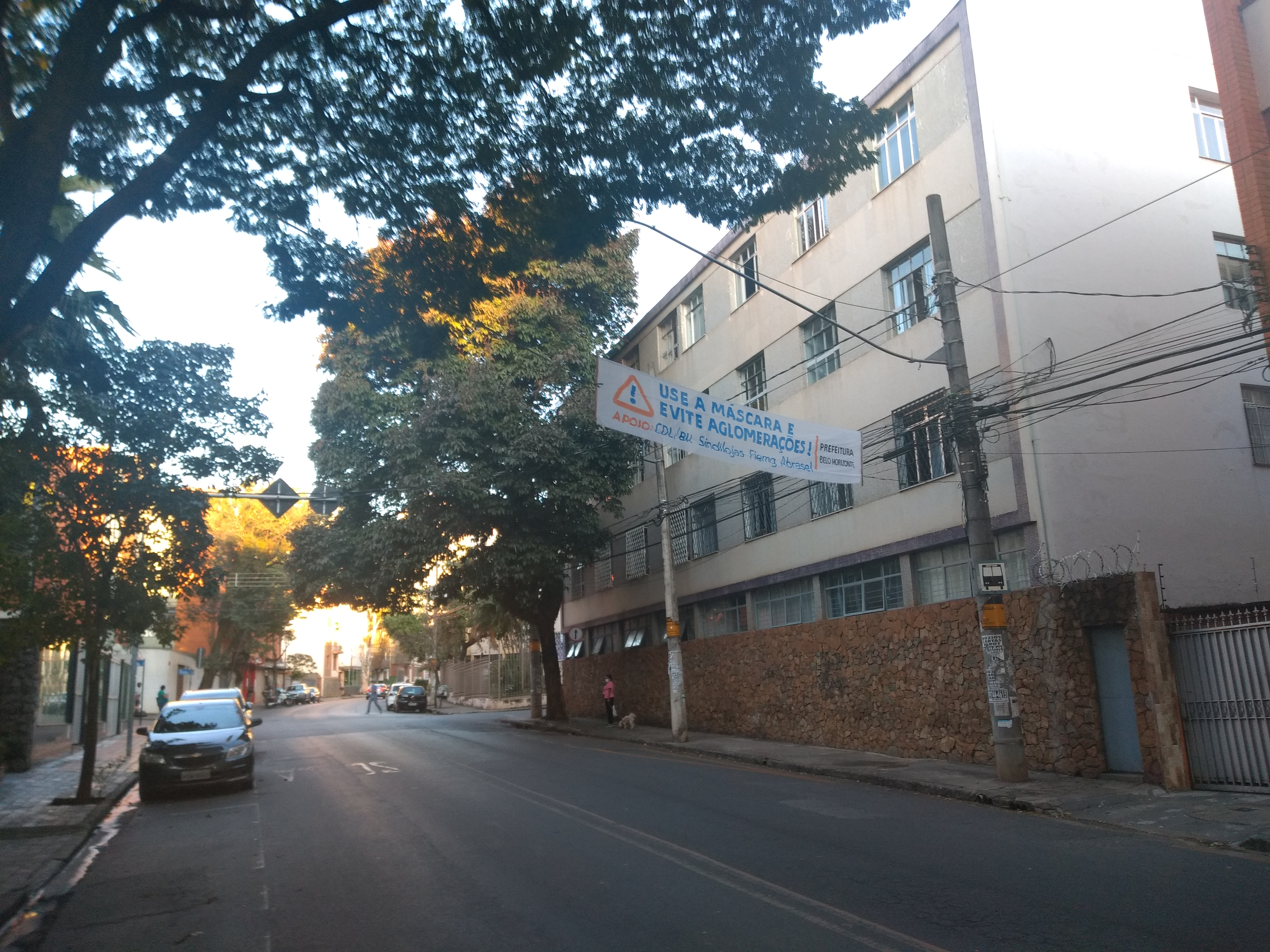 Faixa "Use máscara e evite aglomerações!" na avenida Vitório Marçola, em Belo Horizonte.